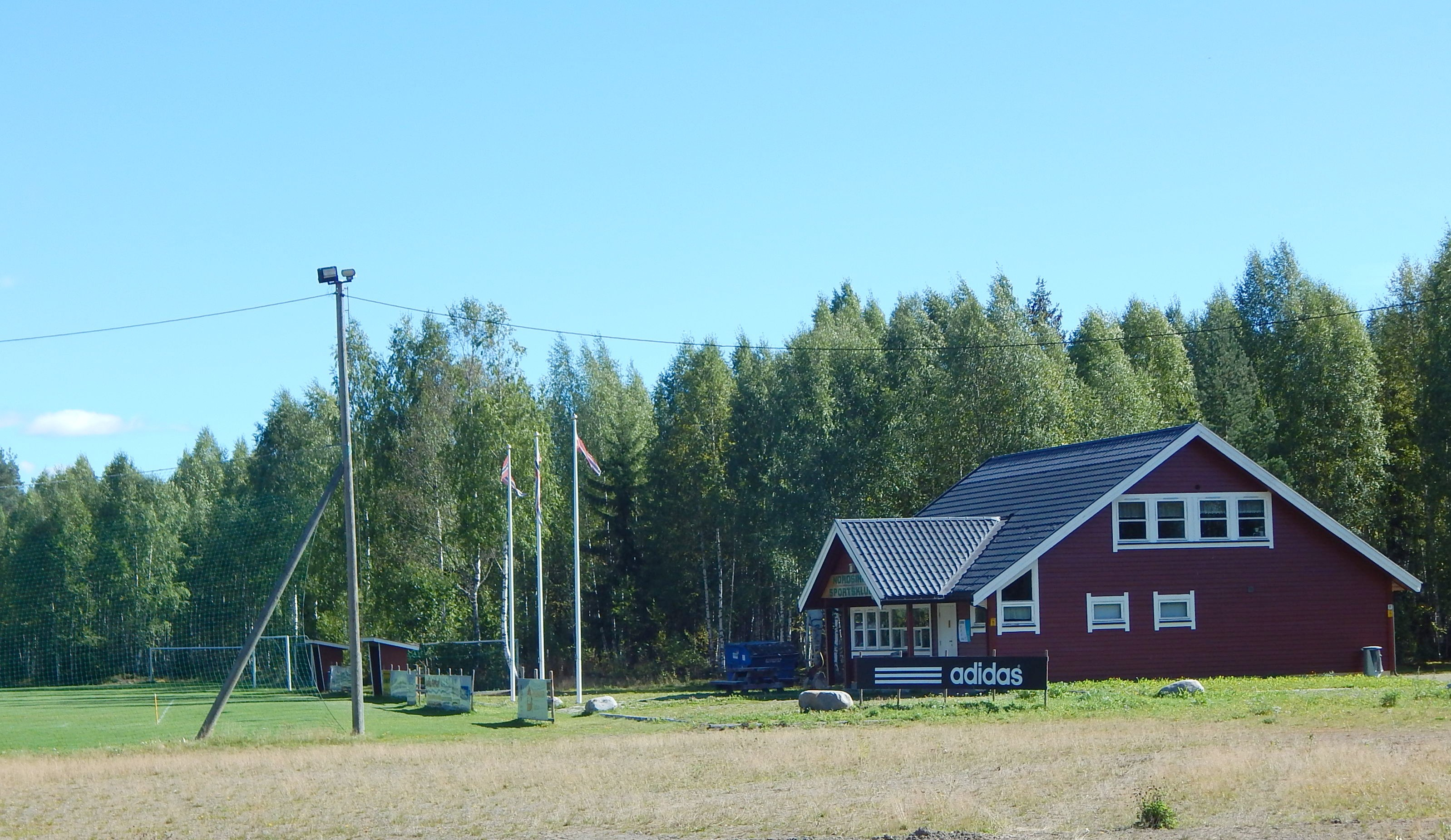 Baggerudmoen idrettsplass, Nordsinni